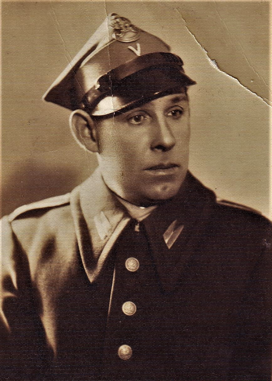 Żołnierz, 14 Pułk Ułanów Jazłowieckich. Napis na rewersie: "Drogiej mej Mamie i Siostrze daję siebie i swoją podobiznę Puides (Pnides), 21 II 1937" Pieczątka: FOTO-PLASTYKA L W Ó W